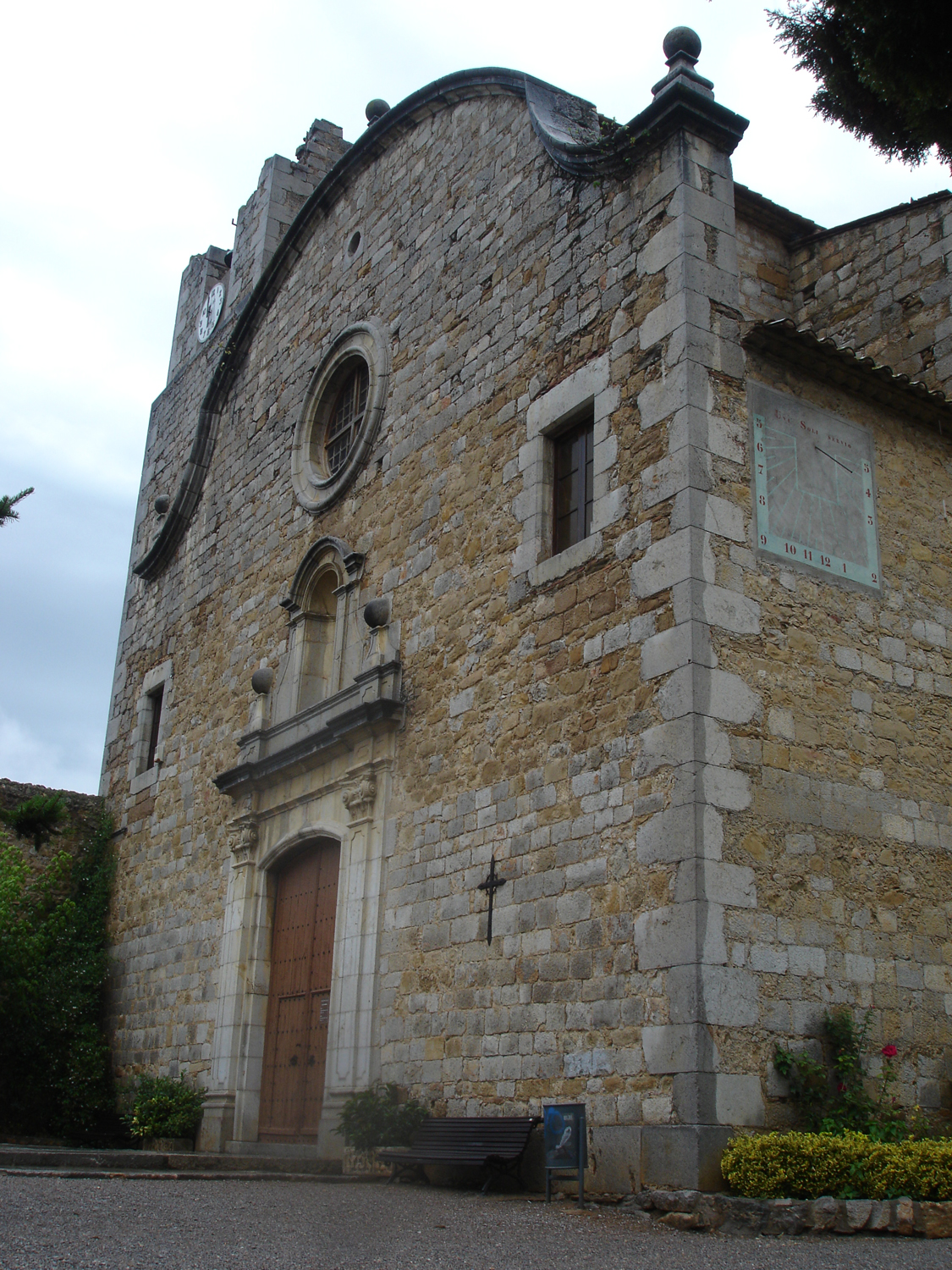 Monestir de Santa Maria d'Ullà (Girona, Catalunya, Espanya)